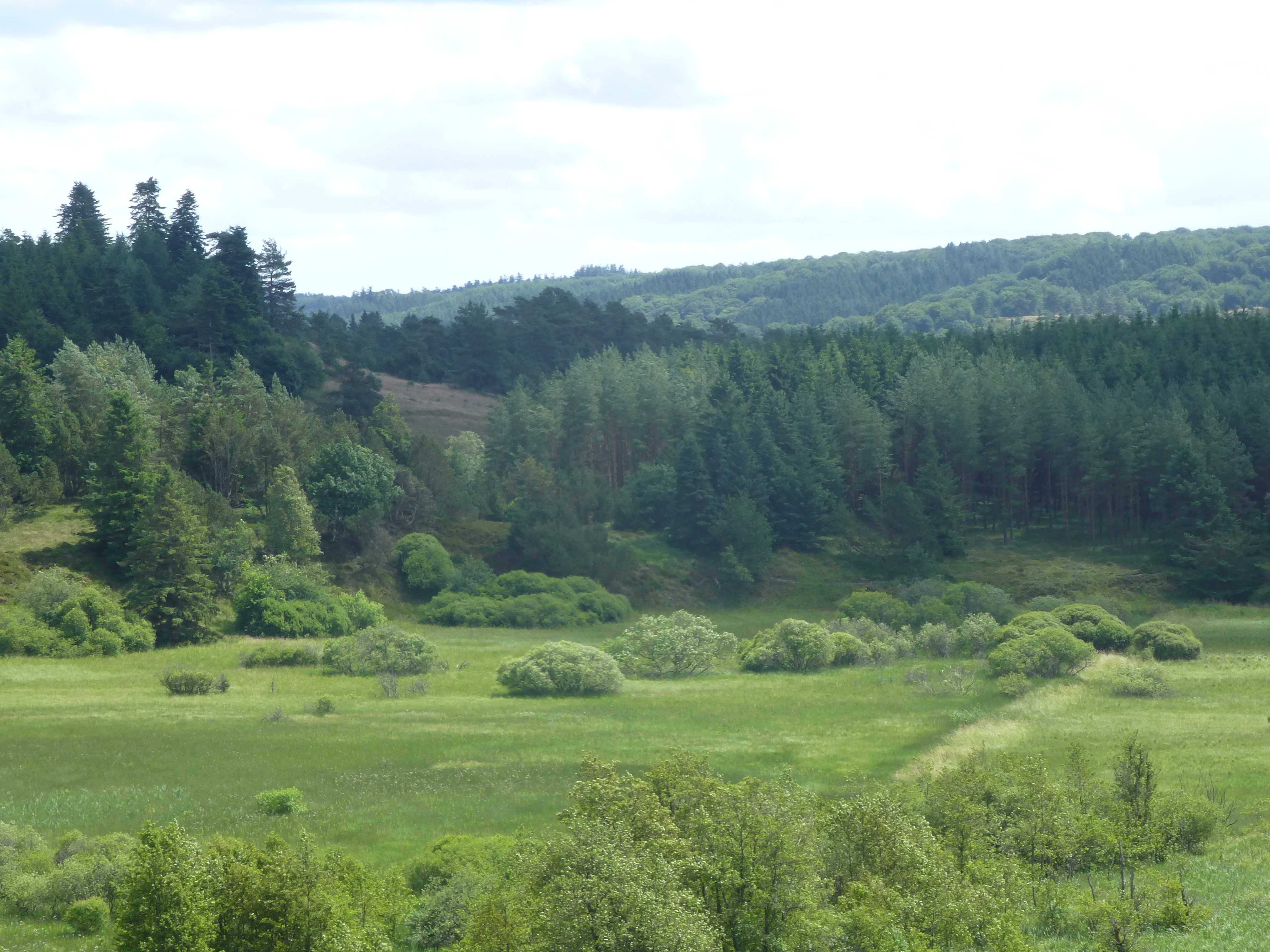 Ansø Enge set fra Blæsbjerge